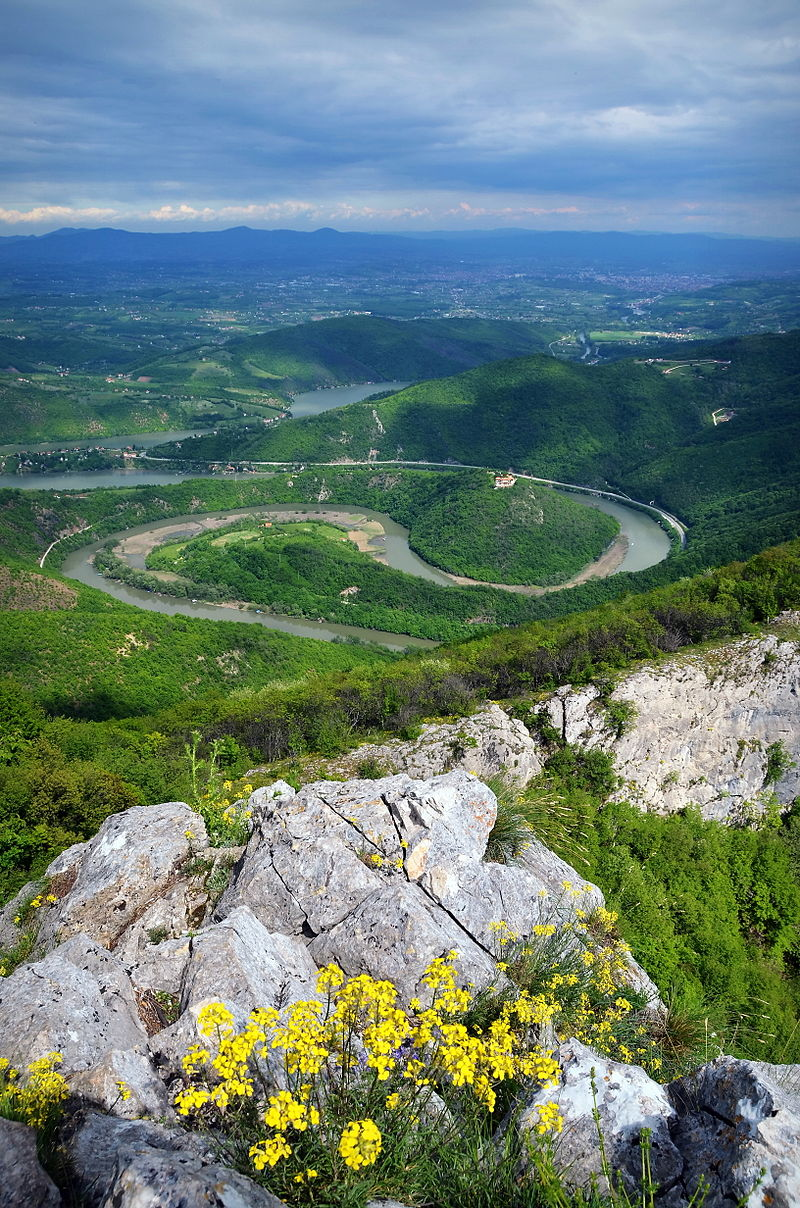 Ovčarsko-kablarska klisura, meandri Zapadne Morave